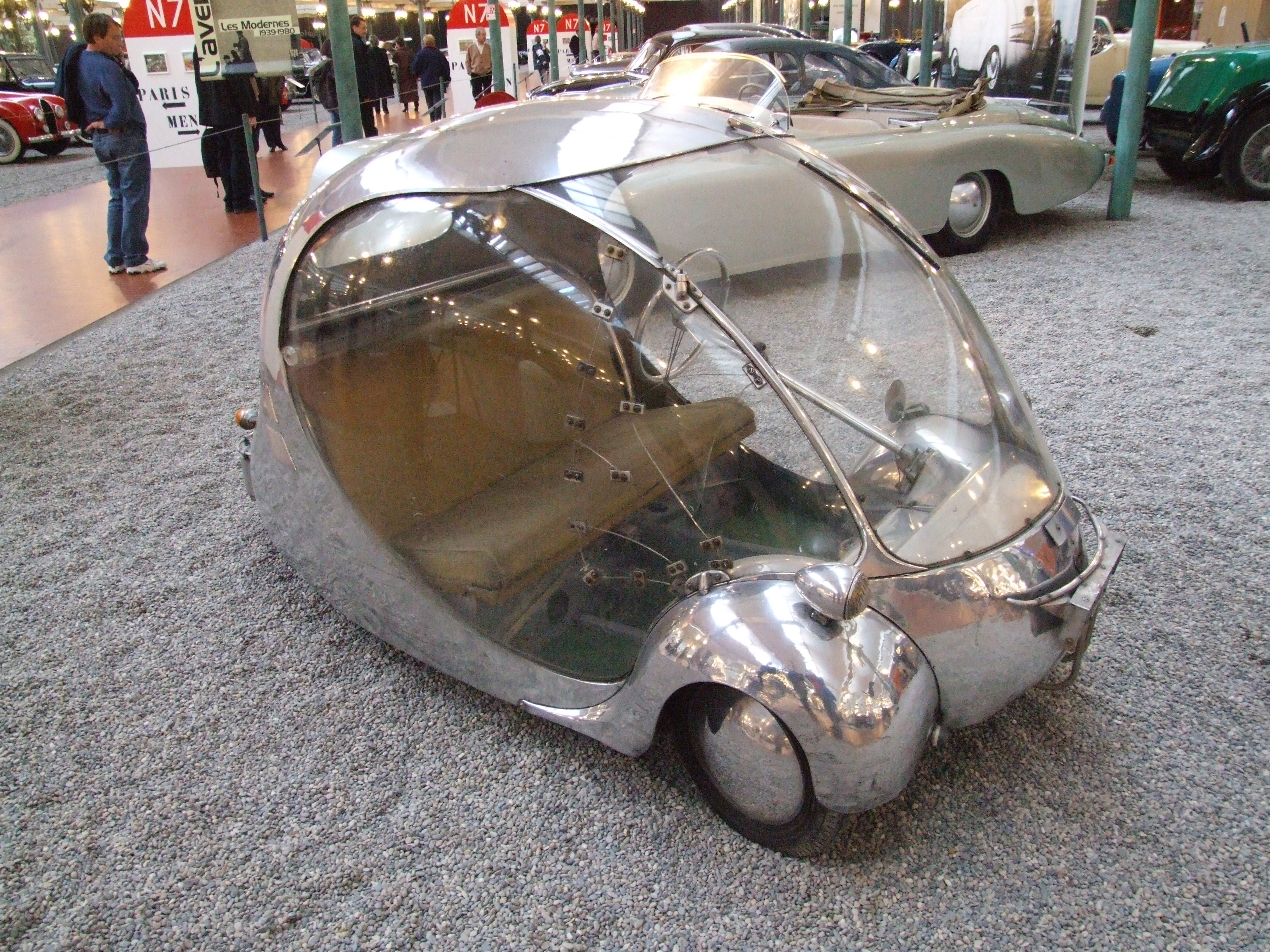 Paul Arzens Oeuf, Cité de l’Automobile – Musée National – Collection Schlumpf, Mülhausen, Frankreich